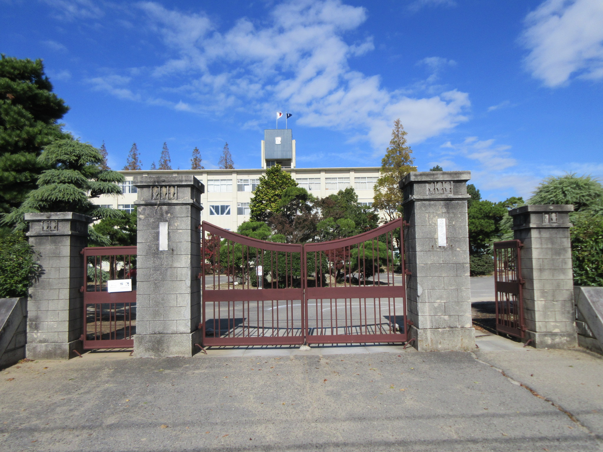 愛知県立西尾高等学校、通用門門柱。登録有形文化財。